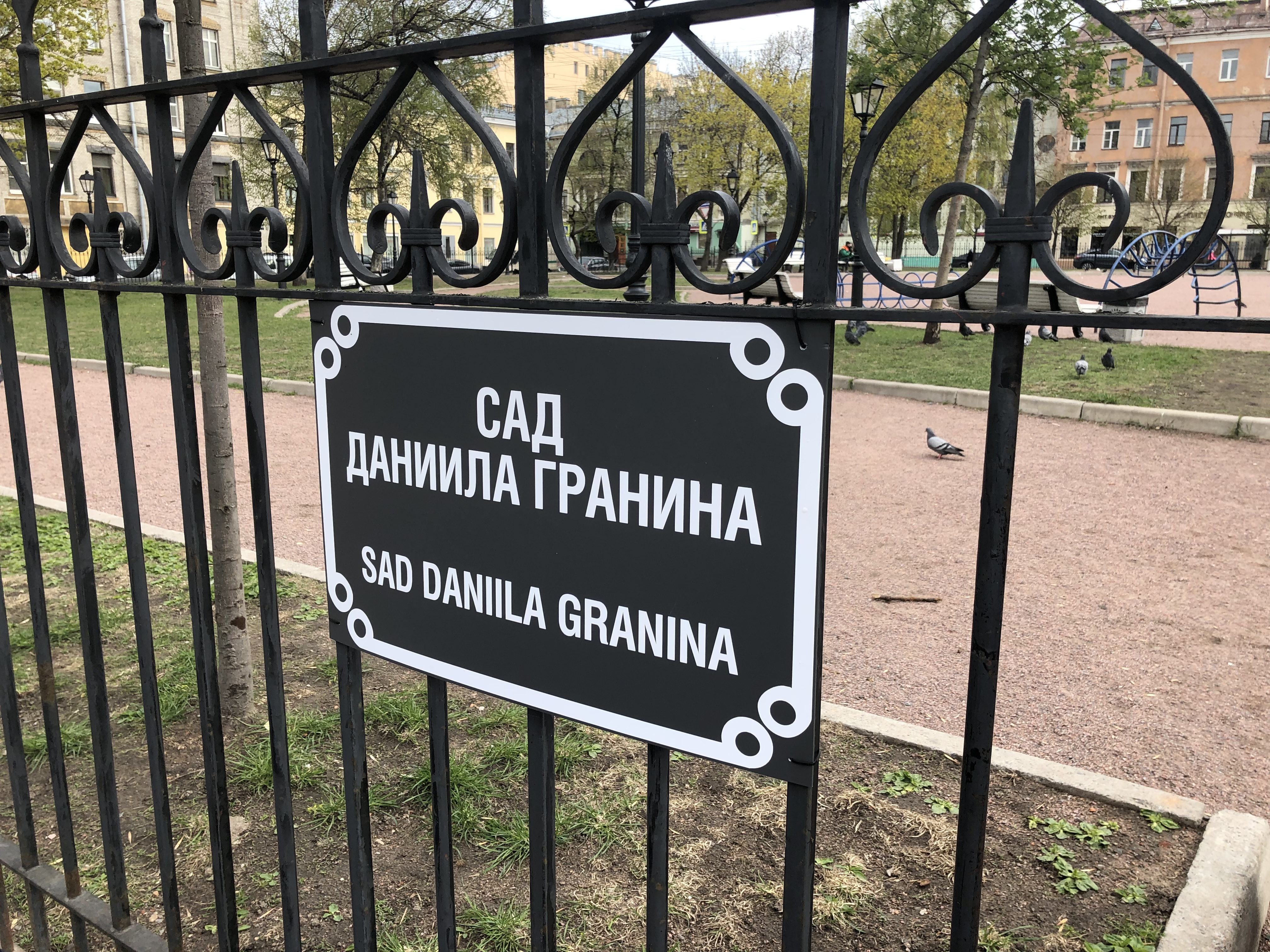 Фотография топонимической таблички Сада Даниила Гранина